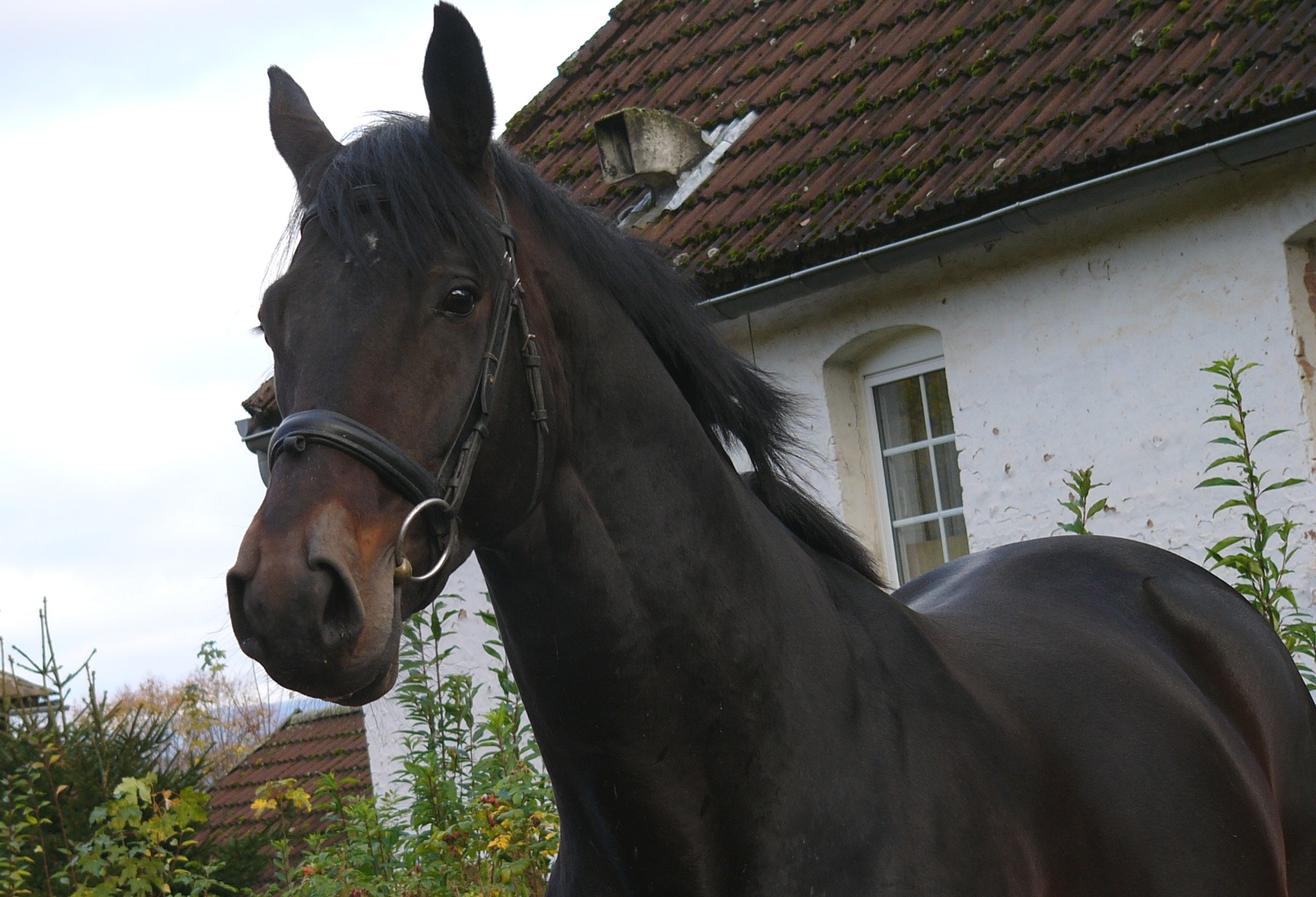 Trakehner Horse